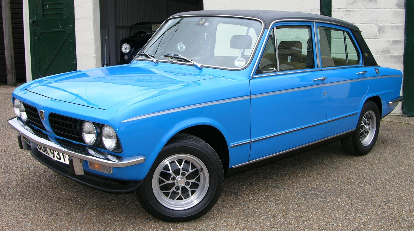 1974 Triumph Dolomite Sprint